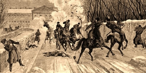 1° marzo 1881. L'attacco mortale a Alessandro II di Russia